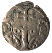 Dinero aragonés (tipo jaqués) del reinado de Pedro II de Aragón (1196-1213)